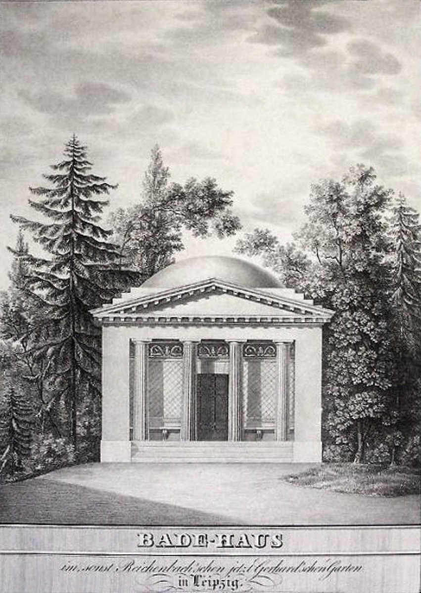 Das Badehaus in Gerhards Garten in Leipzig